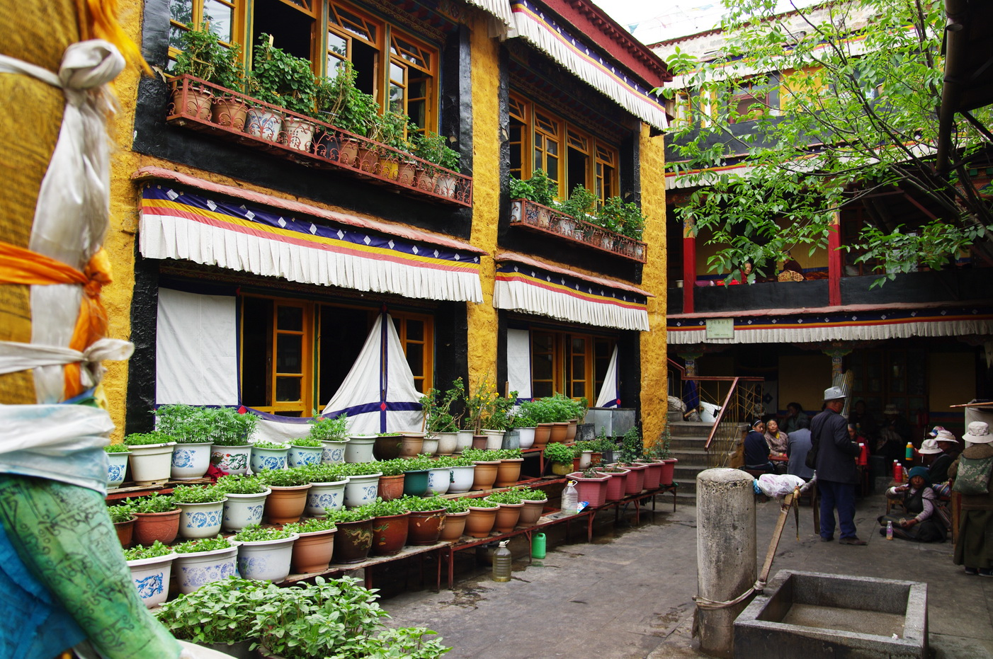 Nonnenkloster Ani Sangkhung, Lhasa